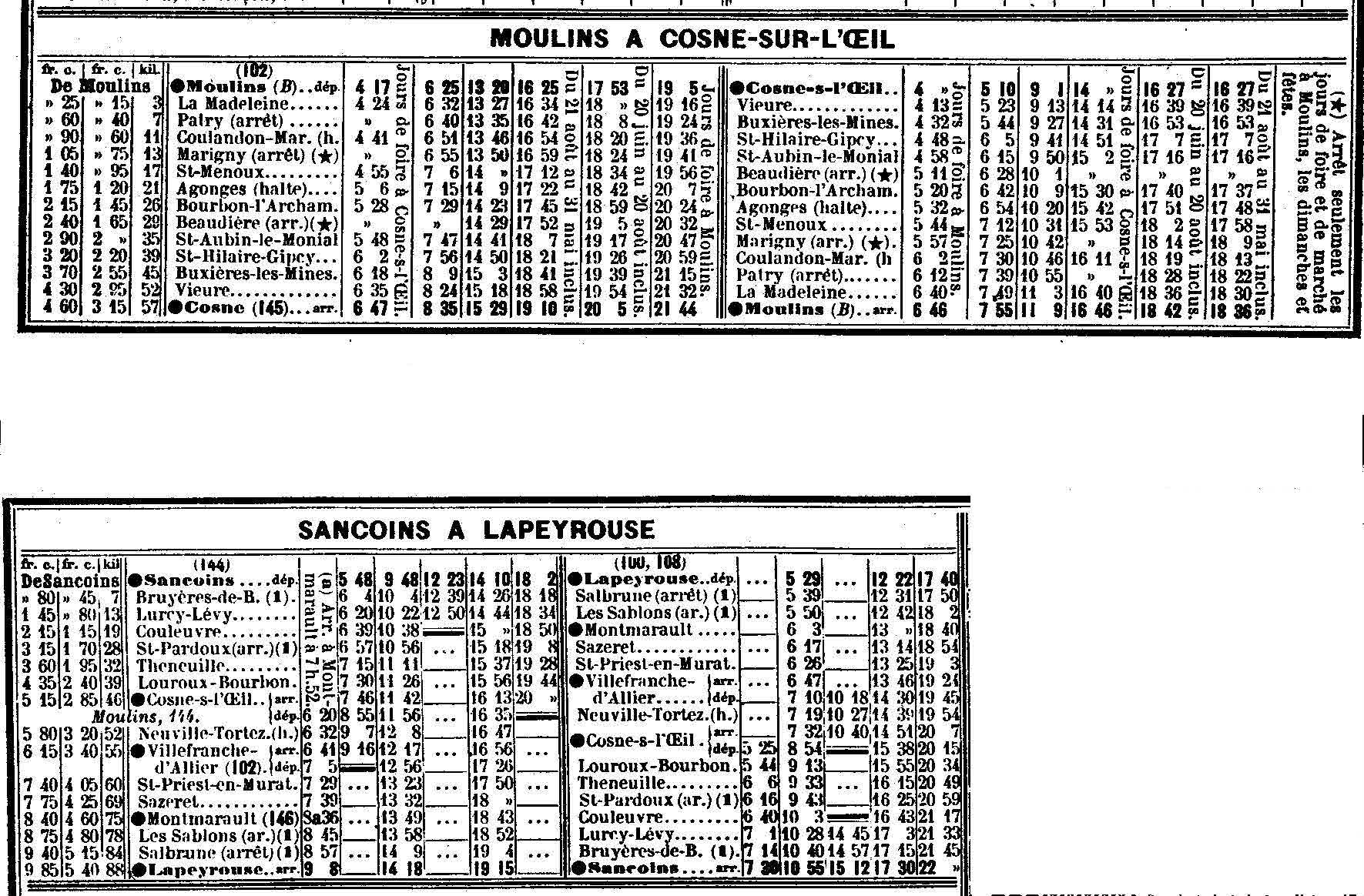 Extrait du Livret Chaix de Mai 1914 (2ème partie : PO (compagnies diverses), pages 144-145 : lignes Moulins à Cosne-sur-l'Œil et Sancoins à Lapeyrouse